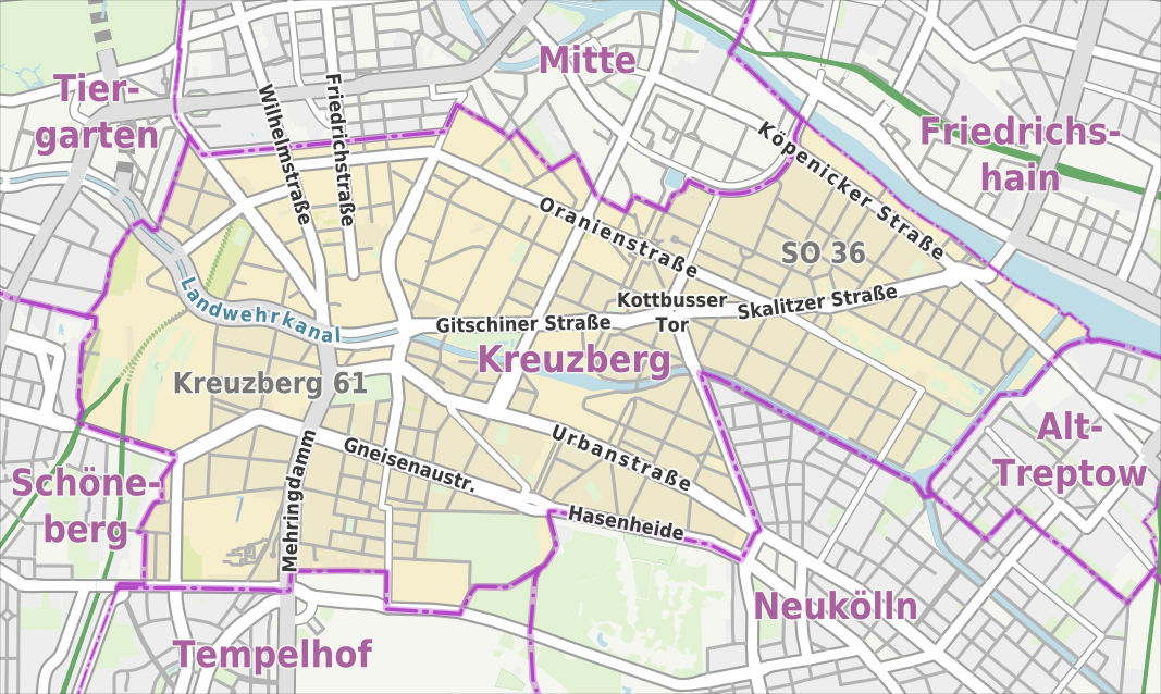 Übersichtskarte der Straßen und Ortslagen in Berlin-Kreuzberg